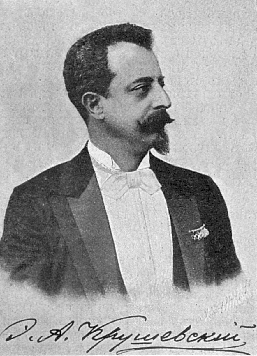 Крушевский, Эдуард Андреевич